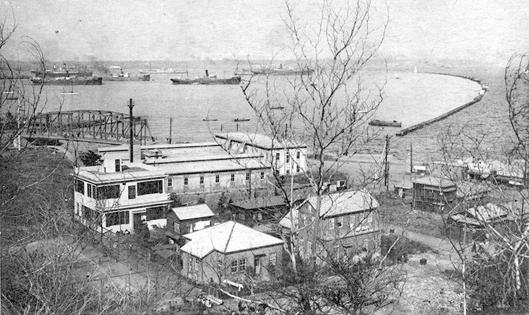 山手から見た横浜港。左の橋は山下橋。中央の一番大きい建物はバンドホテル。